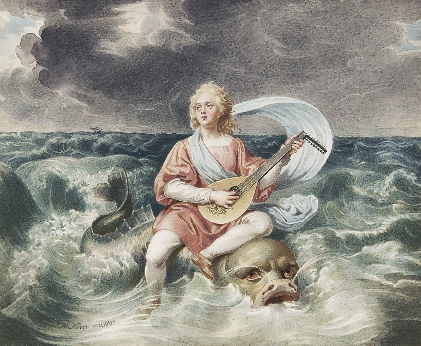 Der arme Sänger (Arion auf dem Delphin). Aquarell auf cremefarbenem Karton. 1841. Ca. 13 : 15,5 cm. Bezeichnet "Der arme Sänger. Ballade von J. v. Zedlitz, gemalt von M. Kern 1841".